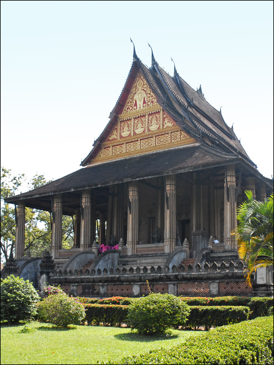 Le Vat Phra Kèo est un ancien temple royal transformé en musée d’art religieux. Il est entouré d’une galerie décorée de statues de Bouddha en bronze dans diverses positions de méditation datant du XVIIIe siècle, et d’un bouddha en pierre du IXe siècle. (cf Vat Phra Kèo)